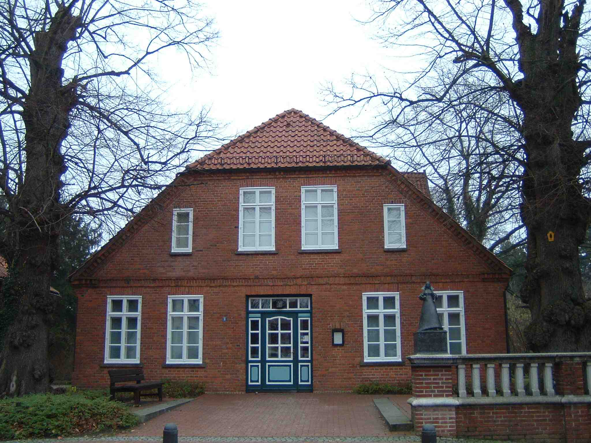 Christinenhaus in Zeven, Germany